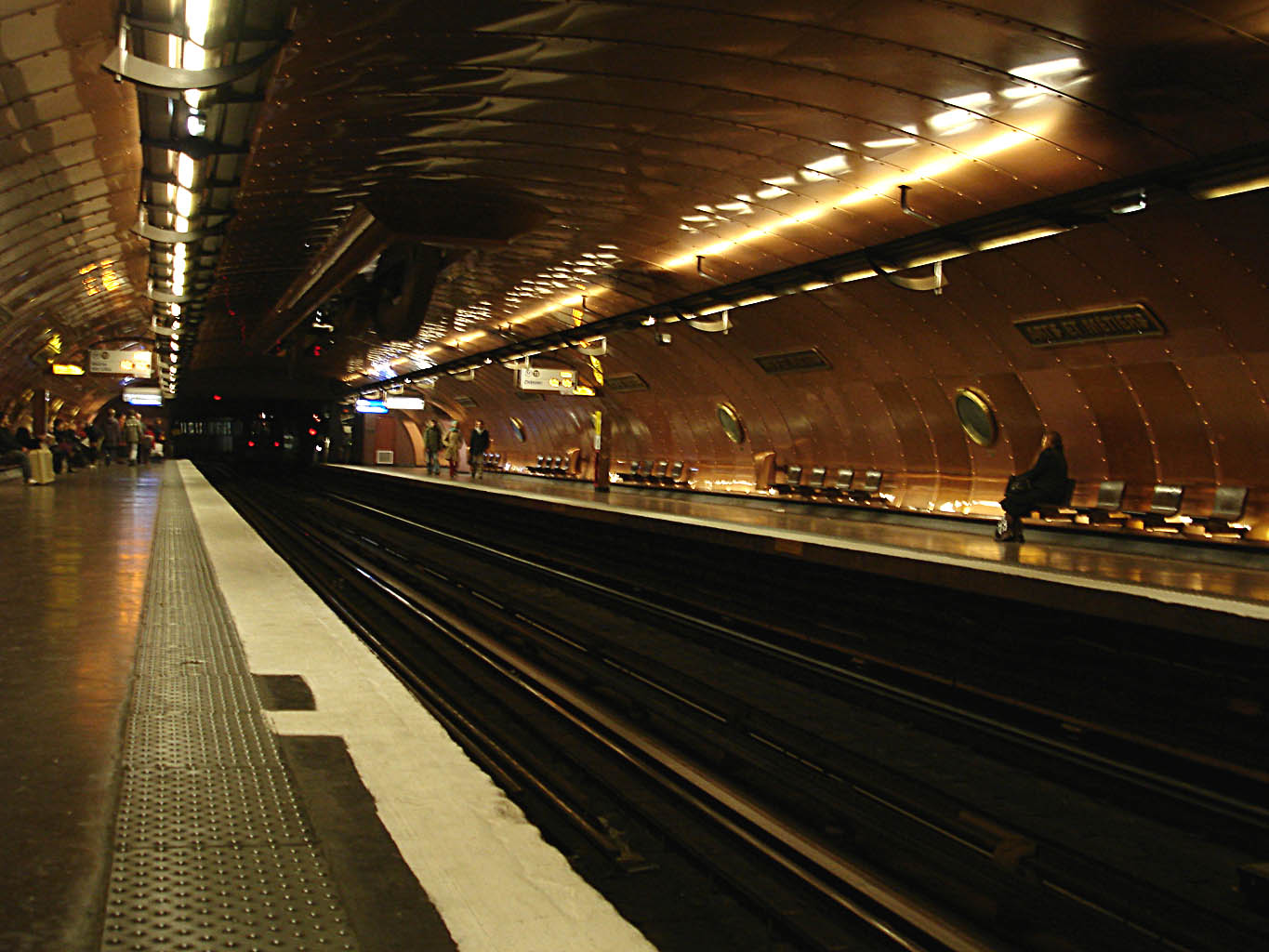 Métro de Paris (France) - ligne 11 - Station Arts et Métiers - Février 2008